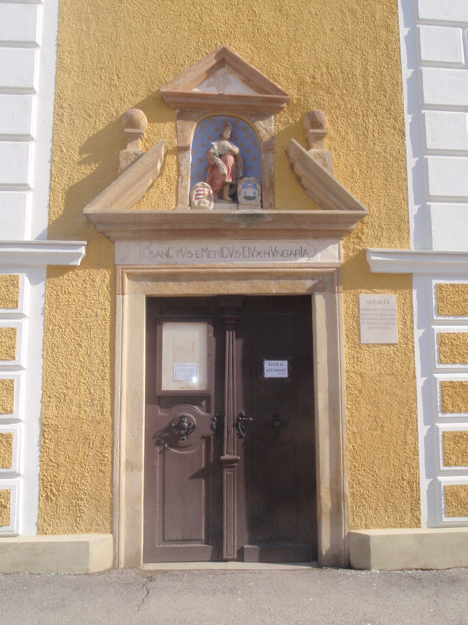 Heiliger Emmerich Kirche Güns